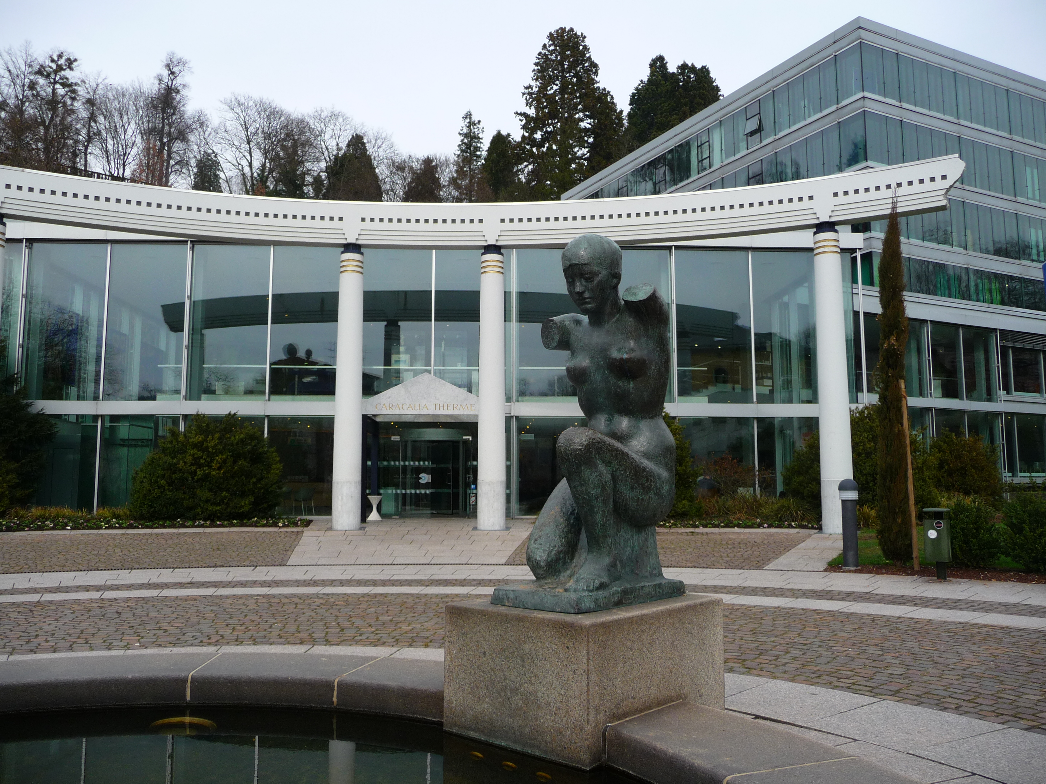 Haupteingang Caracalla Therme in Baden-Baden (auf dem Vorplatz Skulptur von Ludwig Kasper "Kniende", 1944)